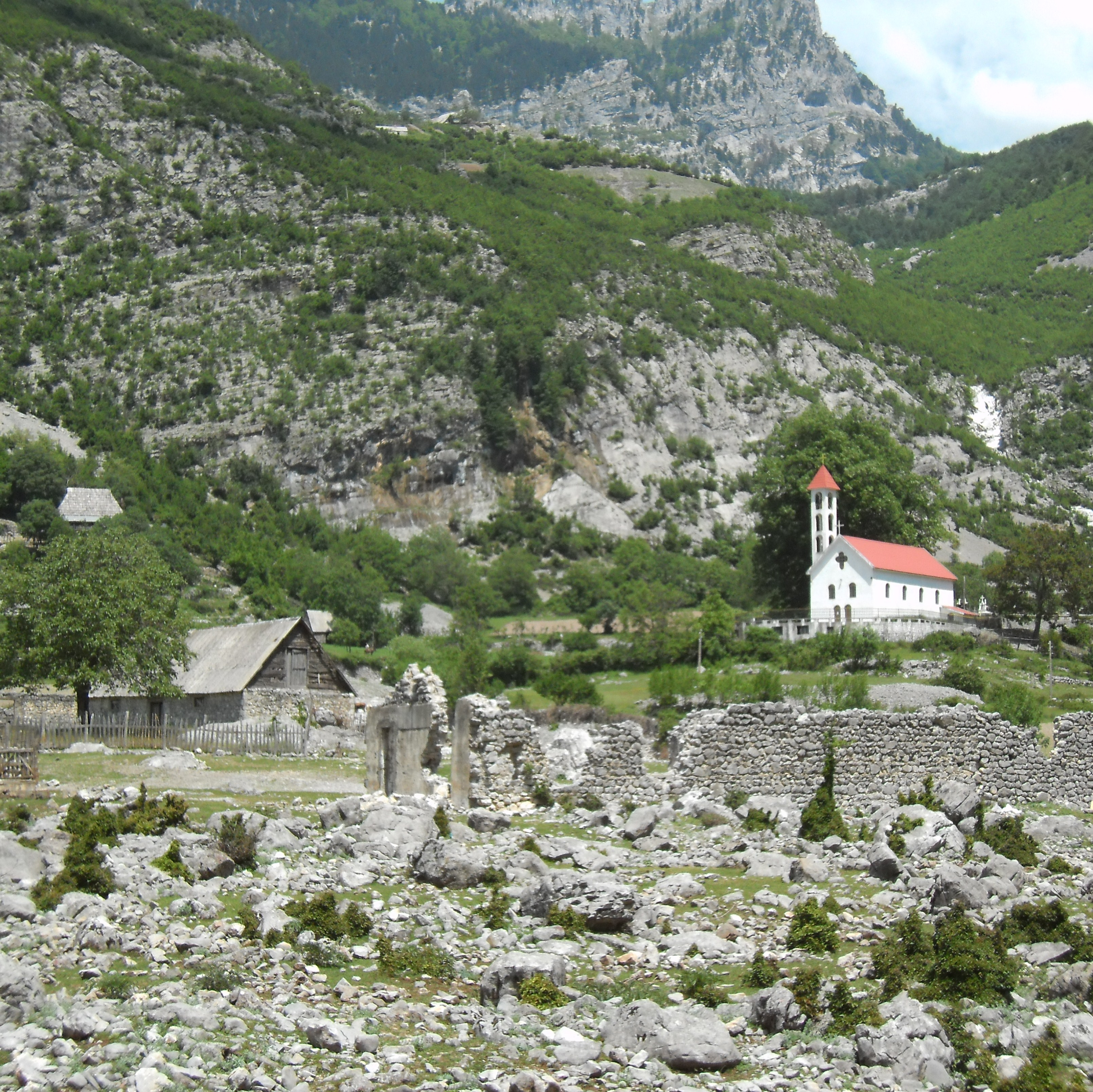 Kirche von Nikc, Albanien